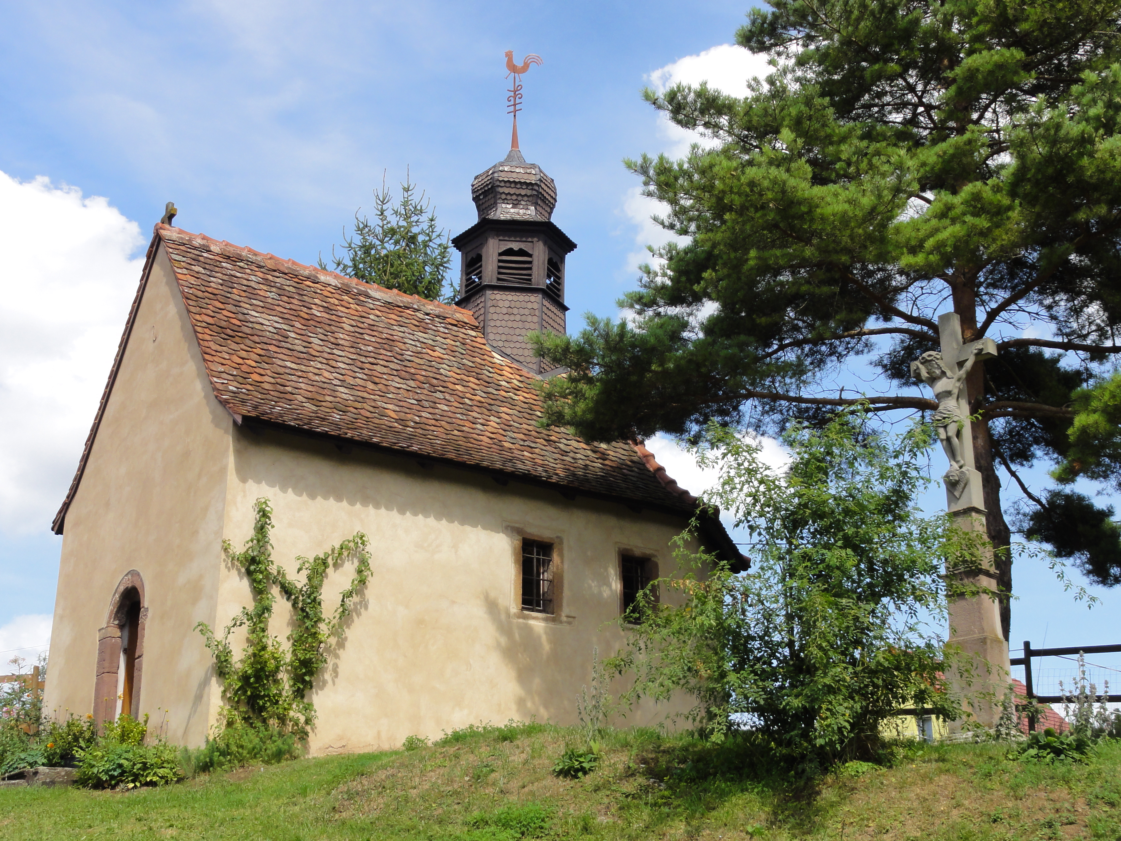 Alsace, Bas-Rhin, Chapelle Saint-Laurent de Gougenheim (IA67005583). Croix monumentale (1724)